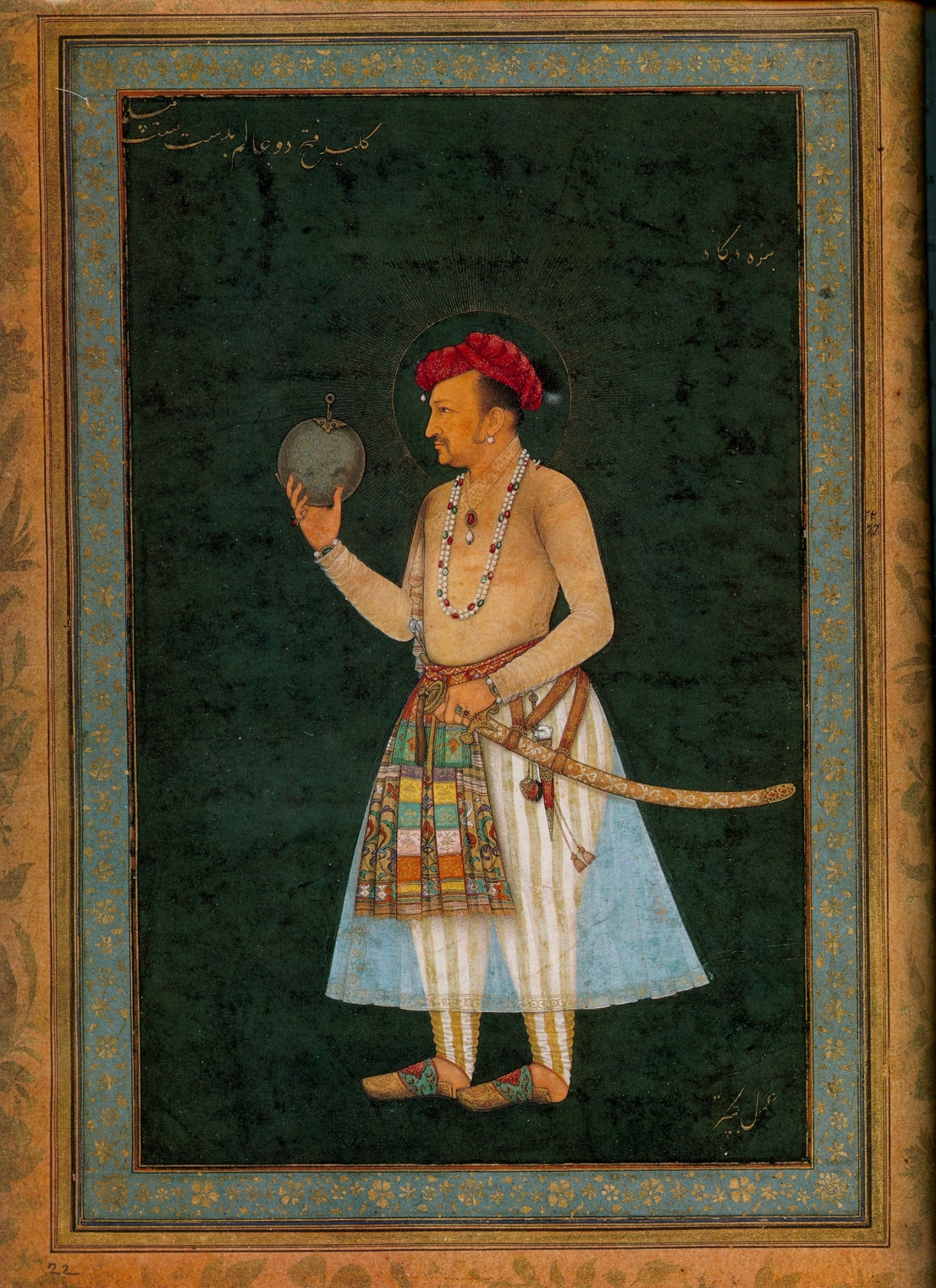 India